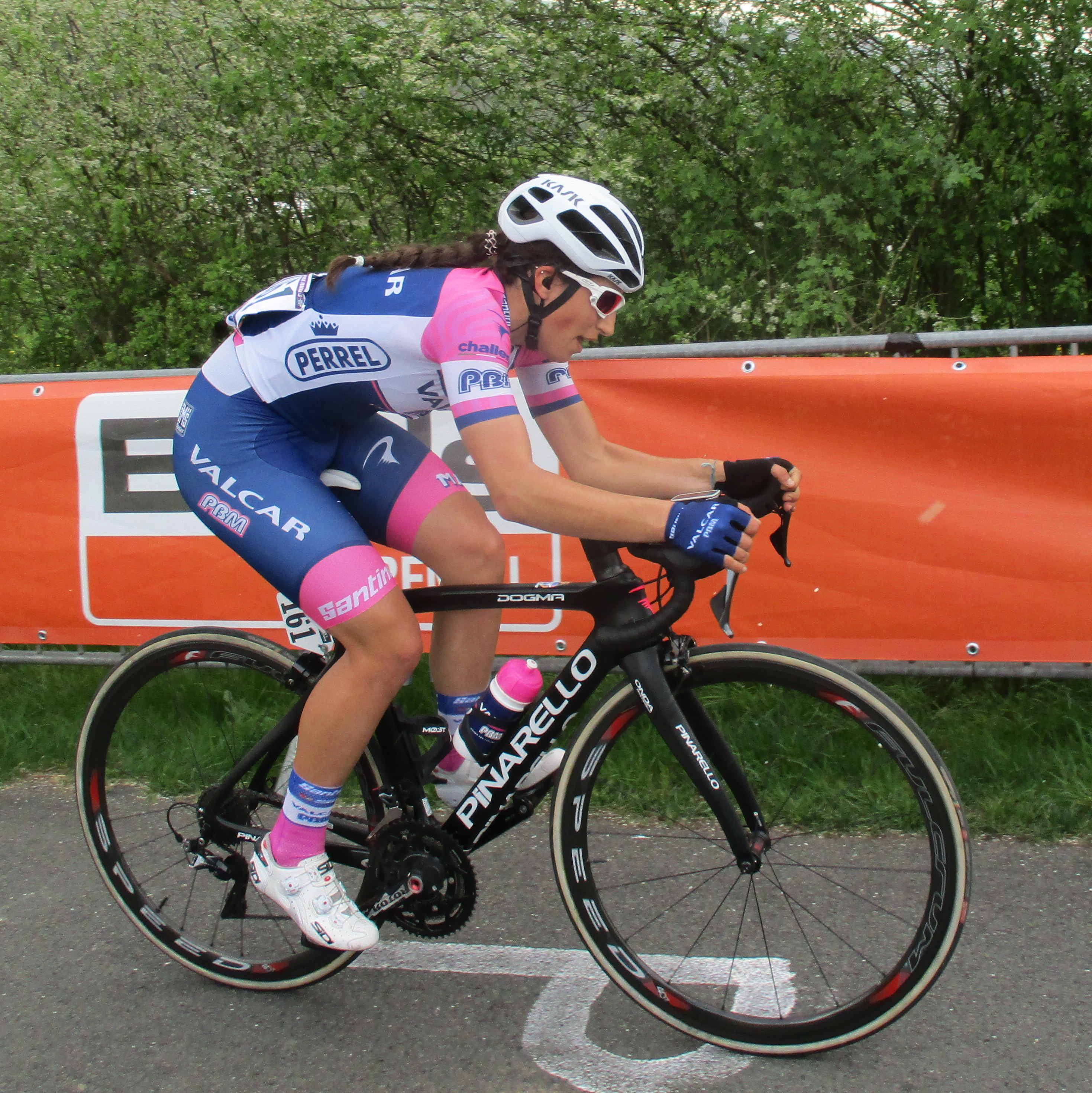 Beklimming van La Redoute tijdens Luik-Bastenaken-Luik 2018 voor vrouwen.